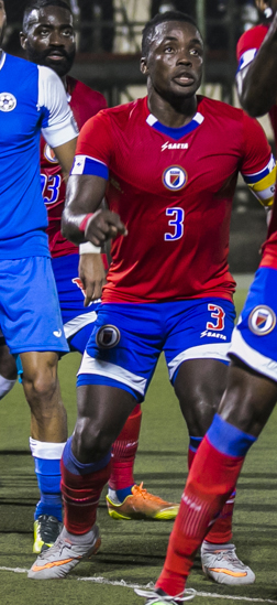 Nicaragua vs Haití repechaje para Copa de oro de la CONCACAF. Marzo 2017. Victoria de Nicaragua